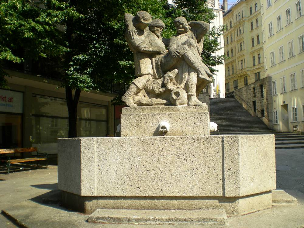 Der denkmalgeschützte Hannakenbrunnen im 1. Wiener Gemeindebezirk Innere Stadt, Am Gestade